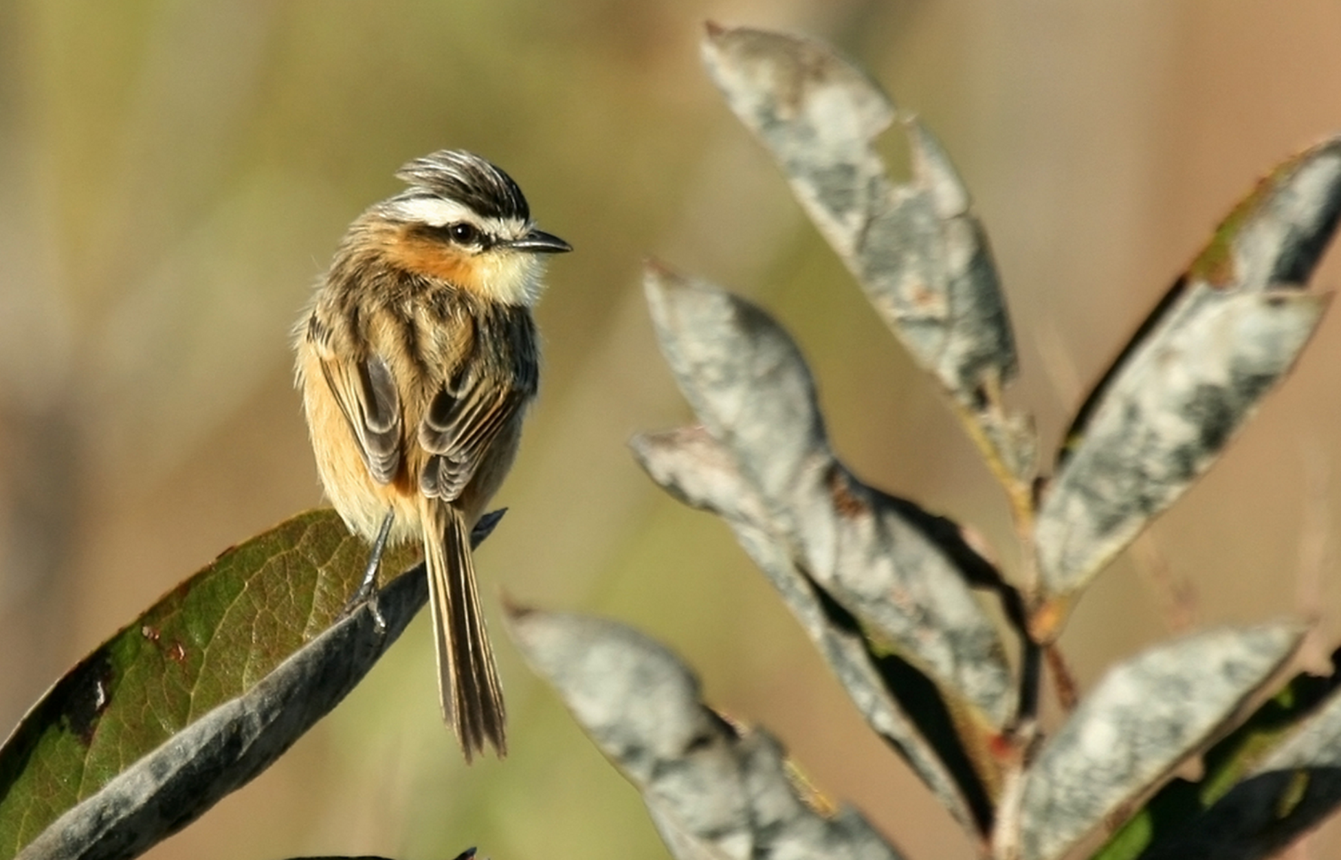 Exemplar adulto de Culicivora caudacuta, foto realizada pelo Prof. Sávio Freire Bruno; em caso de uso, somente creditando-a e que a licença da obra originada seja sob Creative Commons. Espécie em vias de extinção.